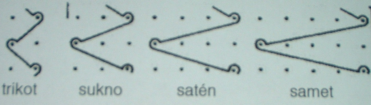 Legungsbilder der Kettengewirke